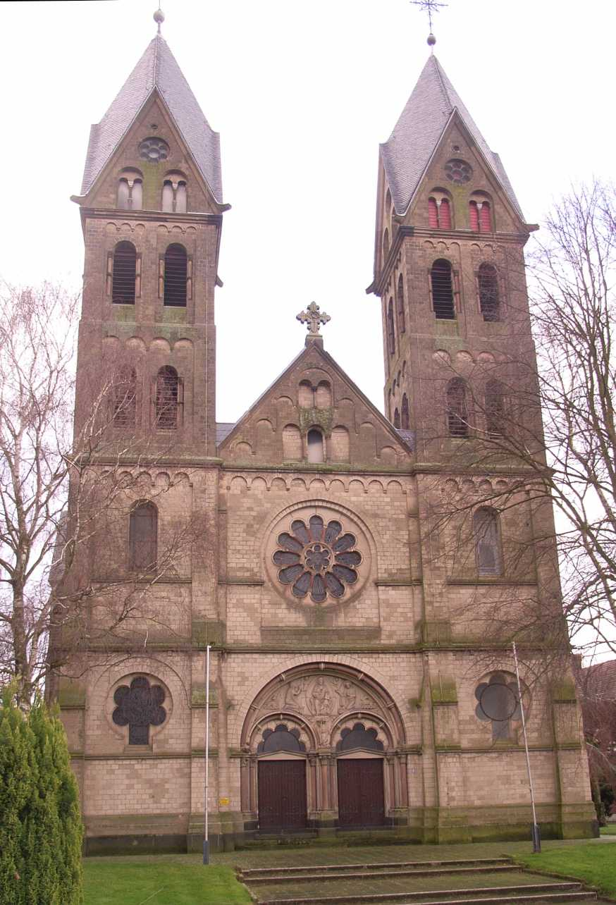 Katholische Pfarrkirche St. Lambertus (erbaut 1888-91) in Immerath. Die mit schiefergedeckten Rombendächern versehenen Türme sind etwa 40 Meter hoch und weithin als Wahrzeichen sichtbar. Über dem Westportal befindet sich ein Tympanon.